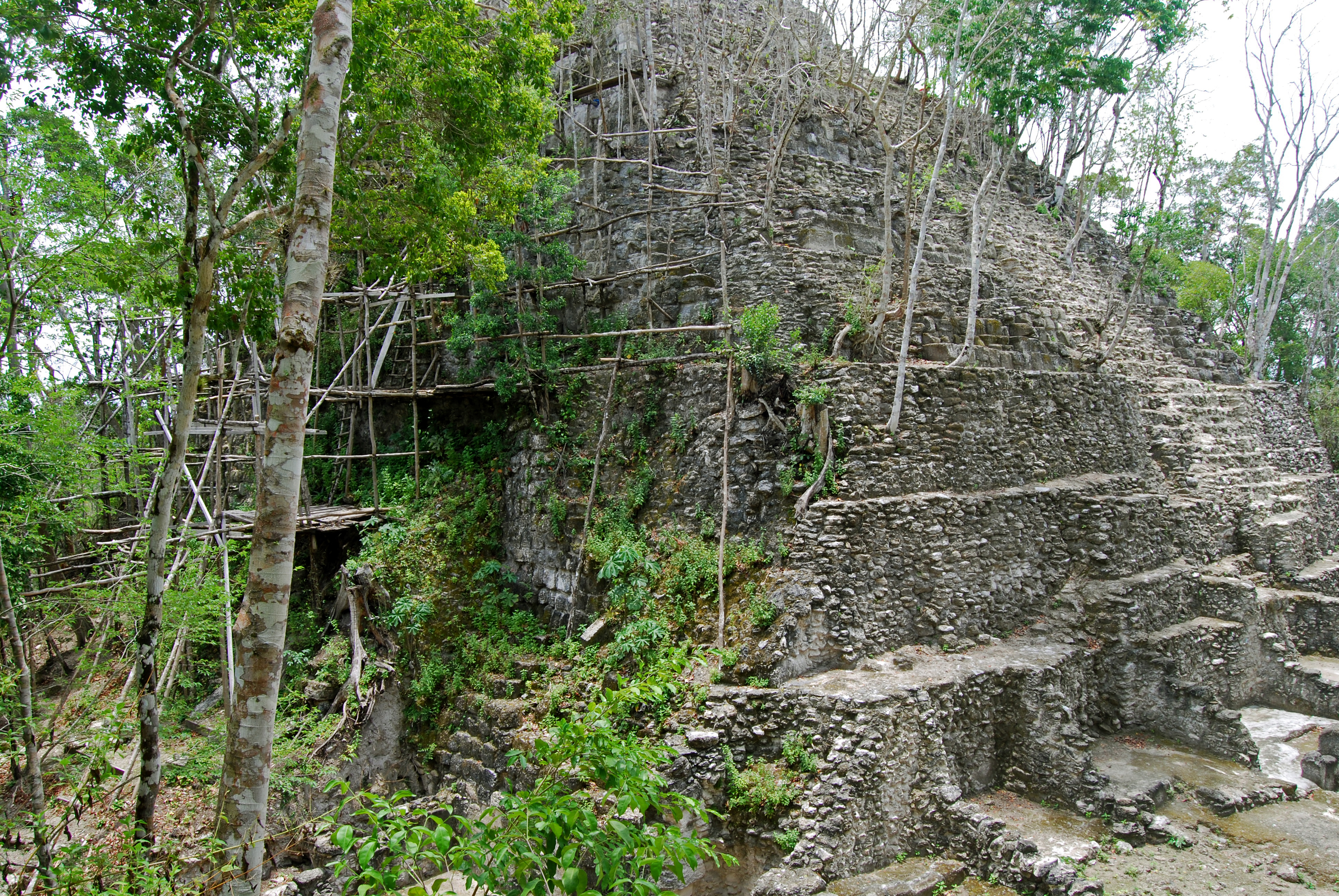 El Mirador